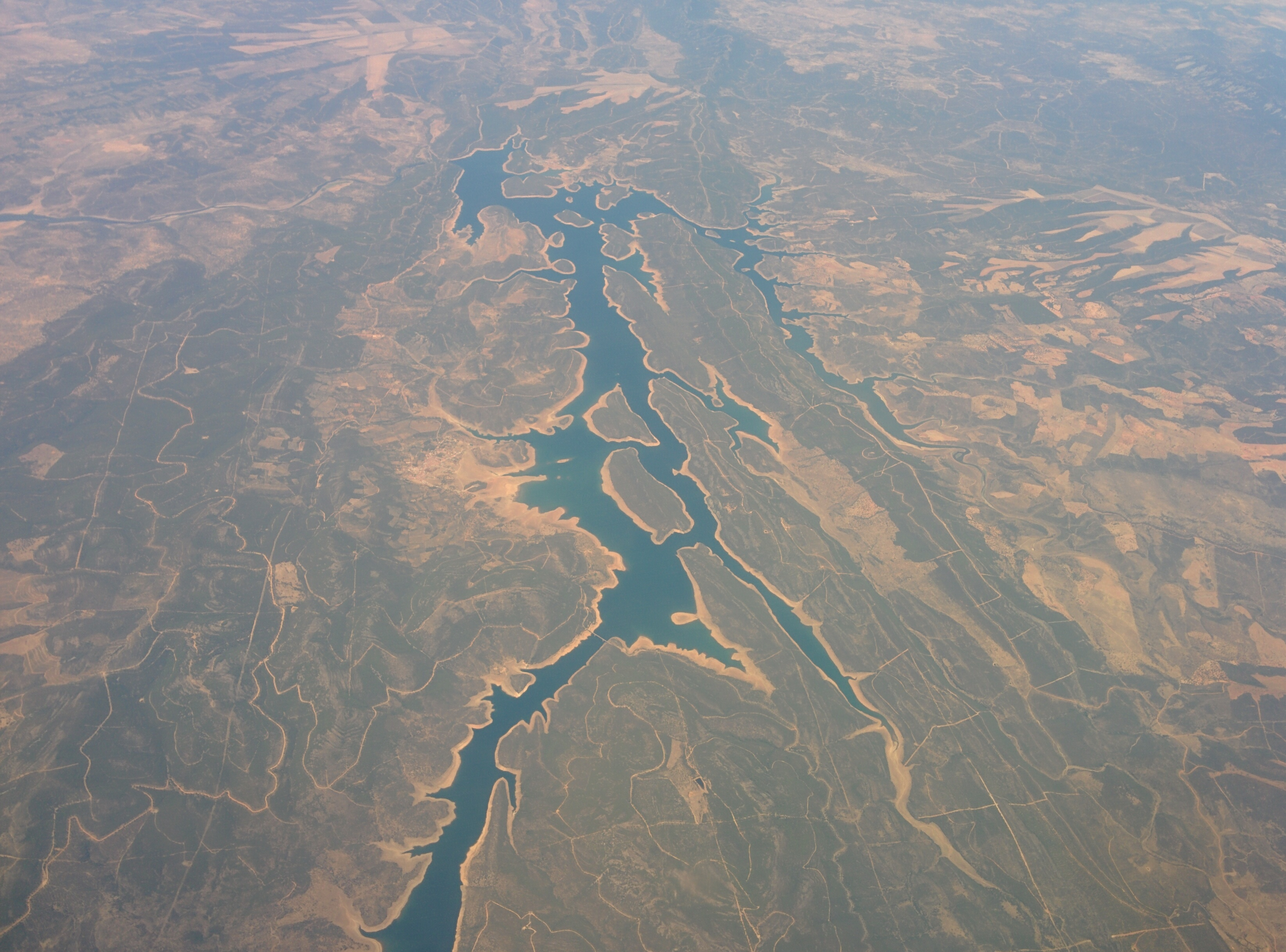 Vista aérea del embalse de Cíjara, entre Cáceres y Badajoz (España).